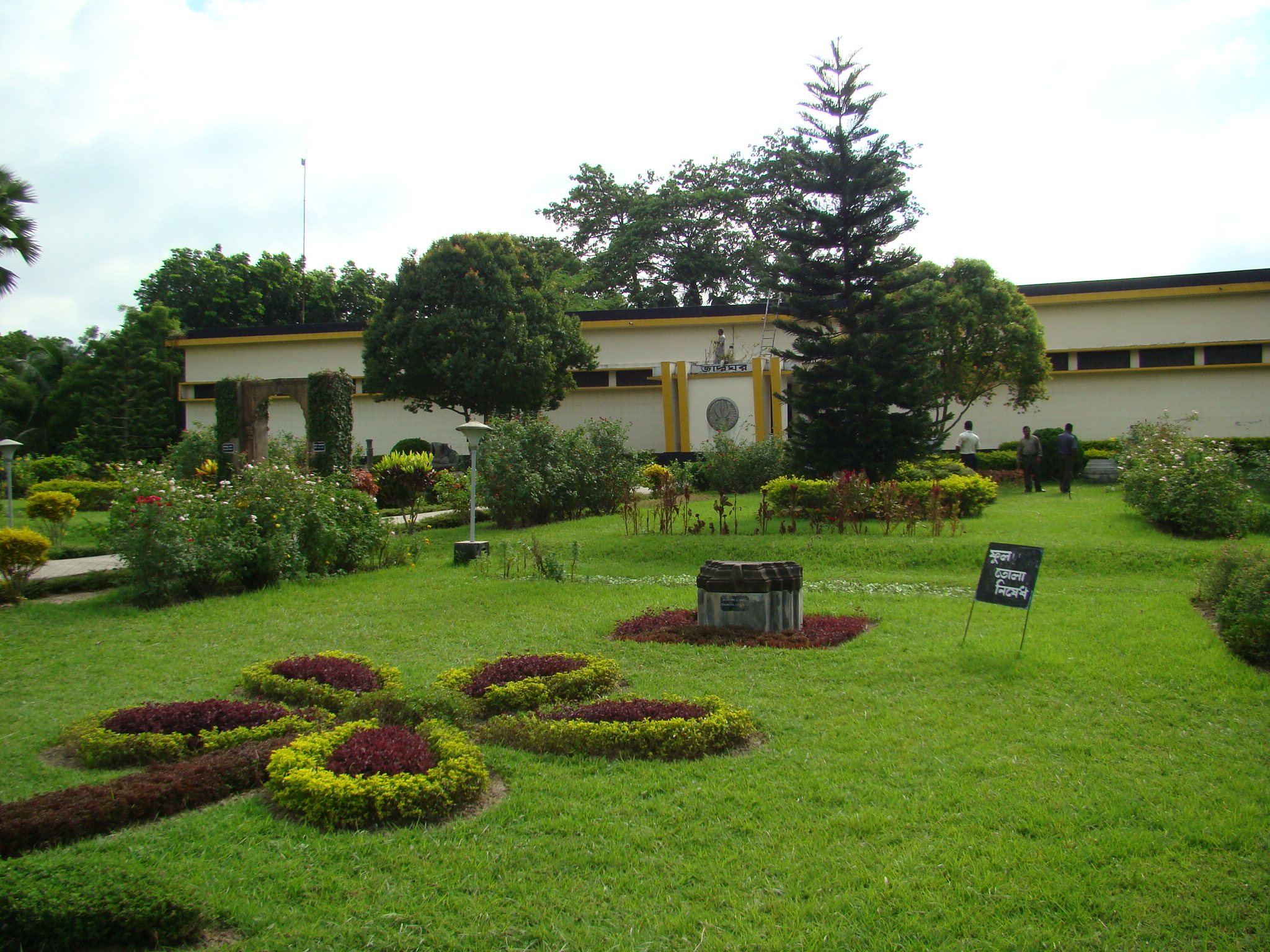 Mahasthangar Museum Bogra Bangladesh